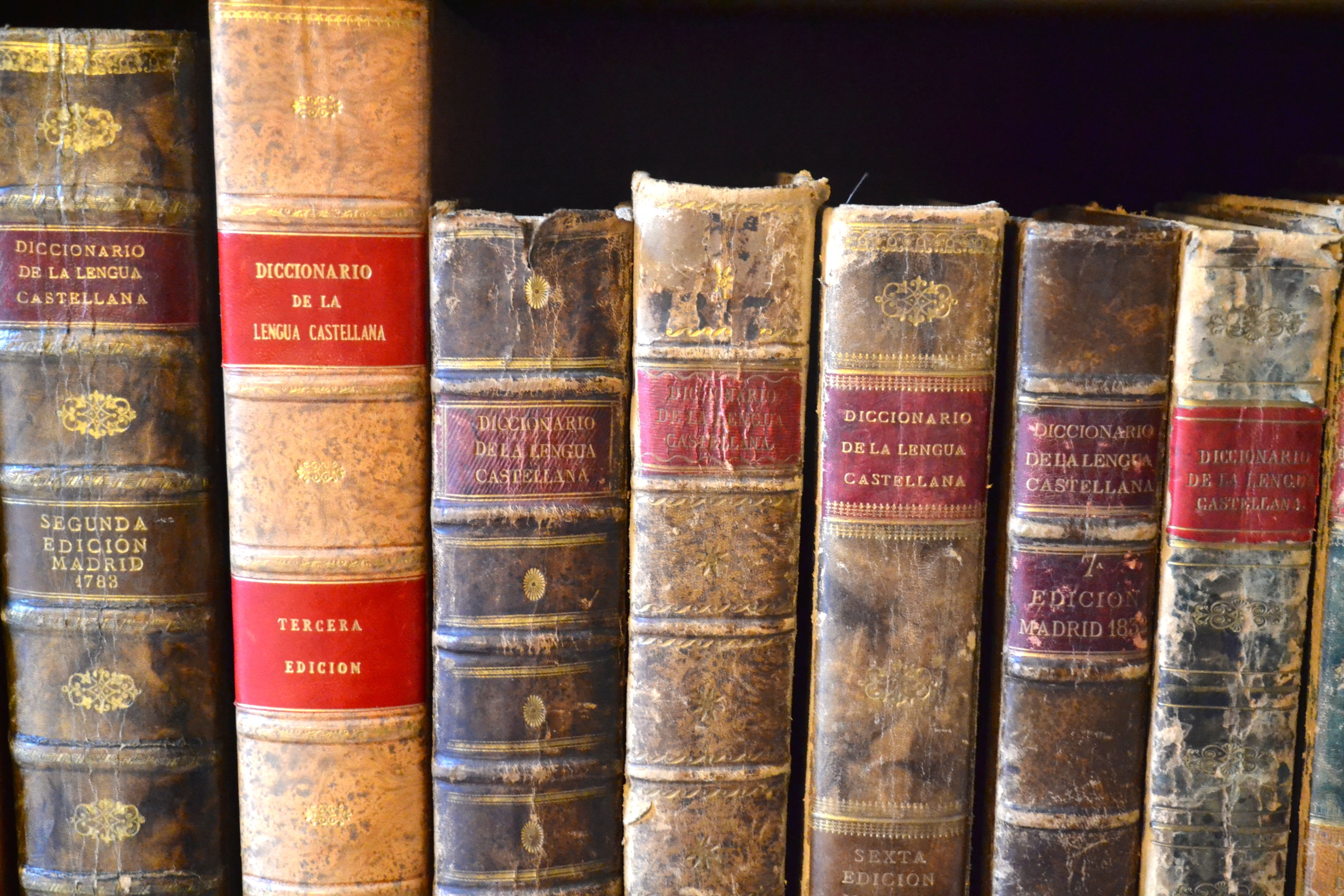 Diccionarios de la Real Academia Española.